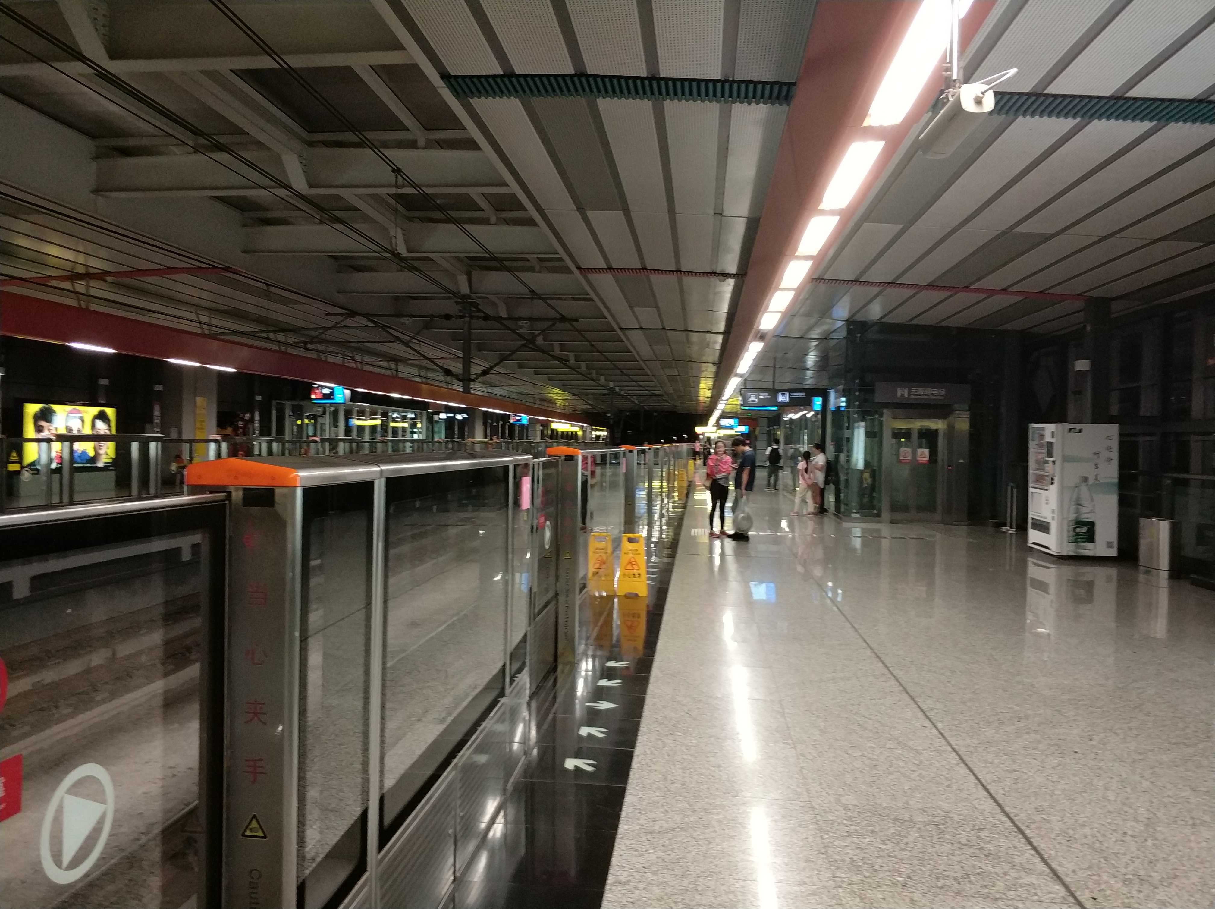 重庆轨道交通大剧院站站台